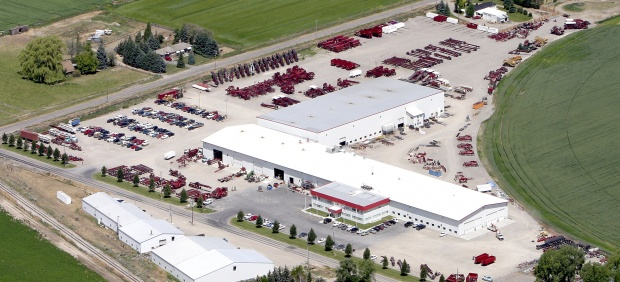 Standort der Firma Spudnik in Blackfoot, Idaho in den USA.